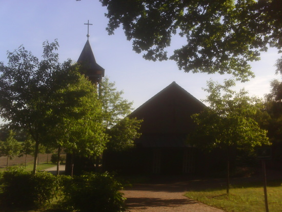 Kirchlinteln: Kapelle in Hohenaverbergen